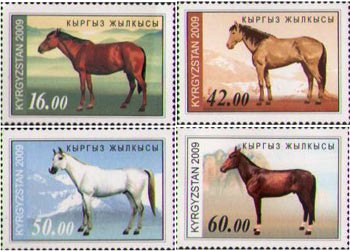 "Kyrgyz horse" 569-572, number by Kyrgyz catalogue